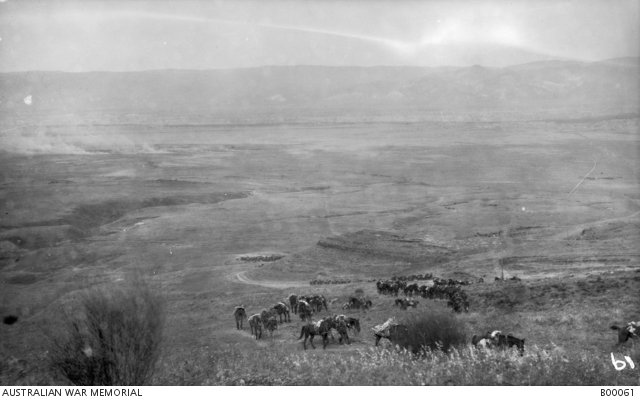 בריגדת הפרשים ה-3 לאחר חציית הירדן בגשר א-דמיה ב 30-באפריל-1918